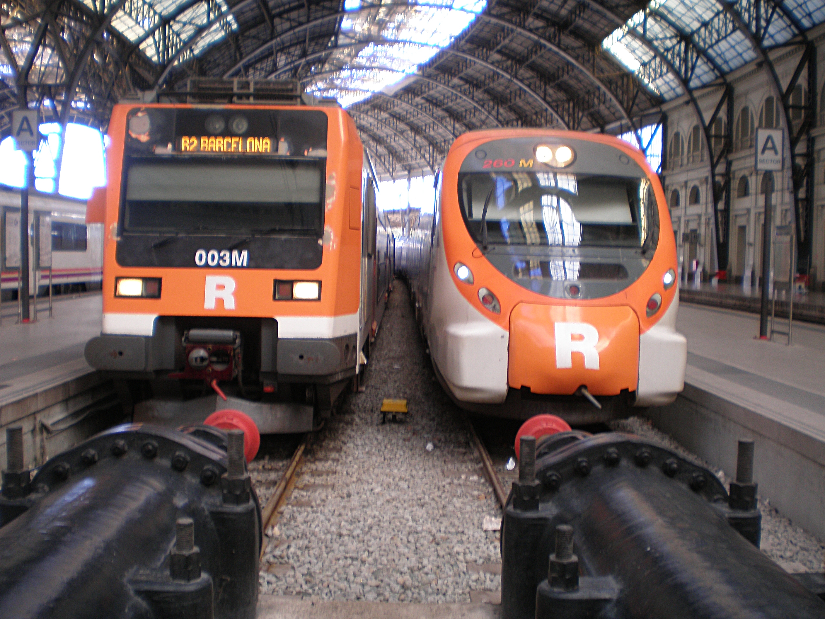 Dos unidades eléctricas, una de la serie 451 (izquierda) y otra Civia (derecha), ambos de Renfe Operadora, en la Estació de França de Barcelona.